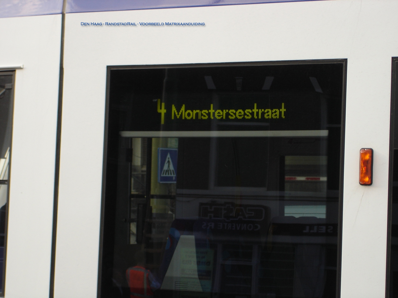 Zelfgefotografeerde media